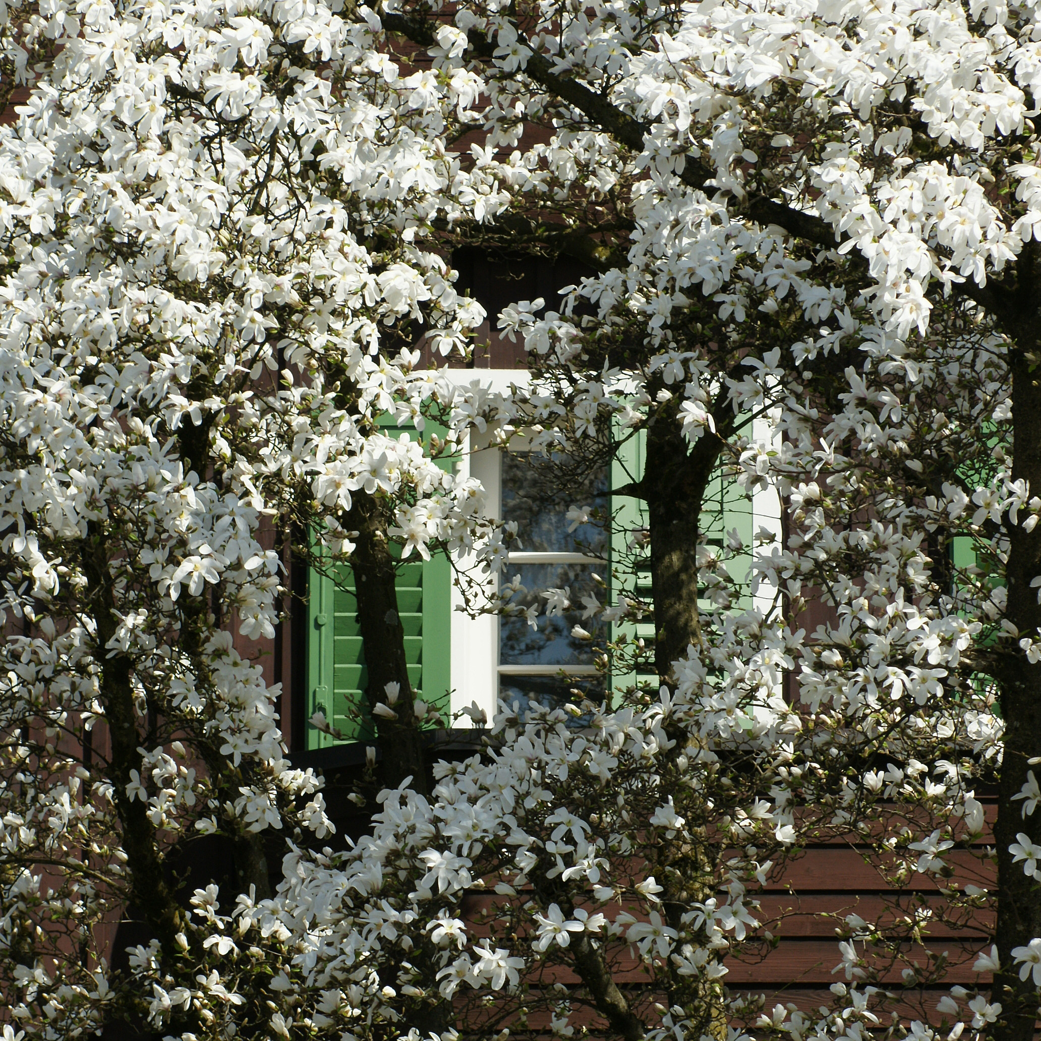 Die Yulan-Magnolie (Magnolia denudata) ist eine Pflanzenart aus der Gattung der Magnolien und gehört damit zu der Familie der Magnoliengewächse (Magnoliaceae). *** Gesehen im Hatlerdorf.